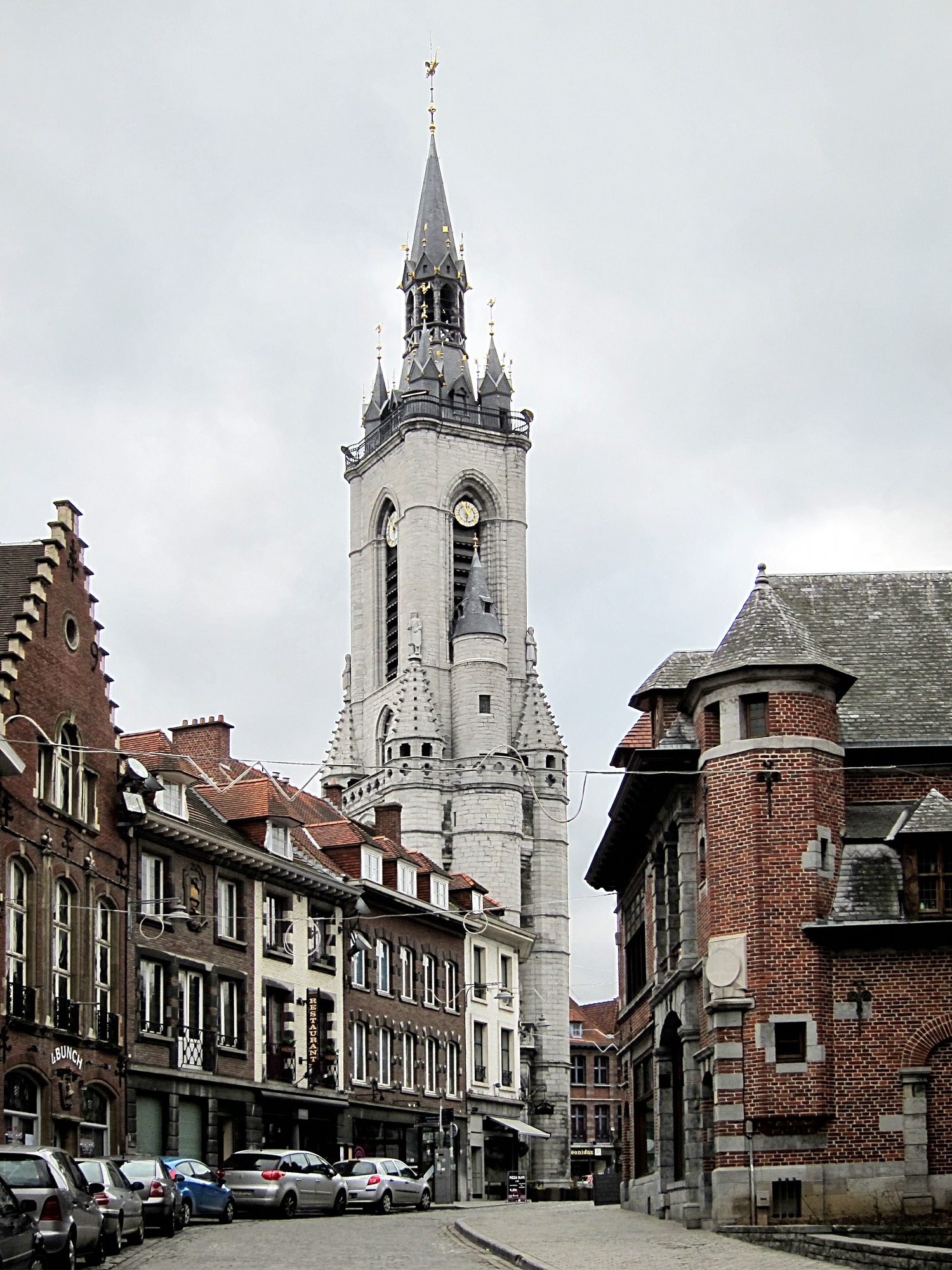 Le beffroi de Tournai.